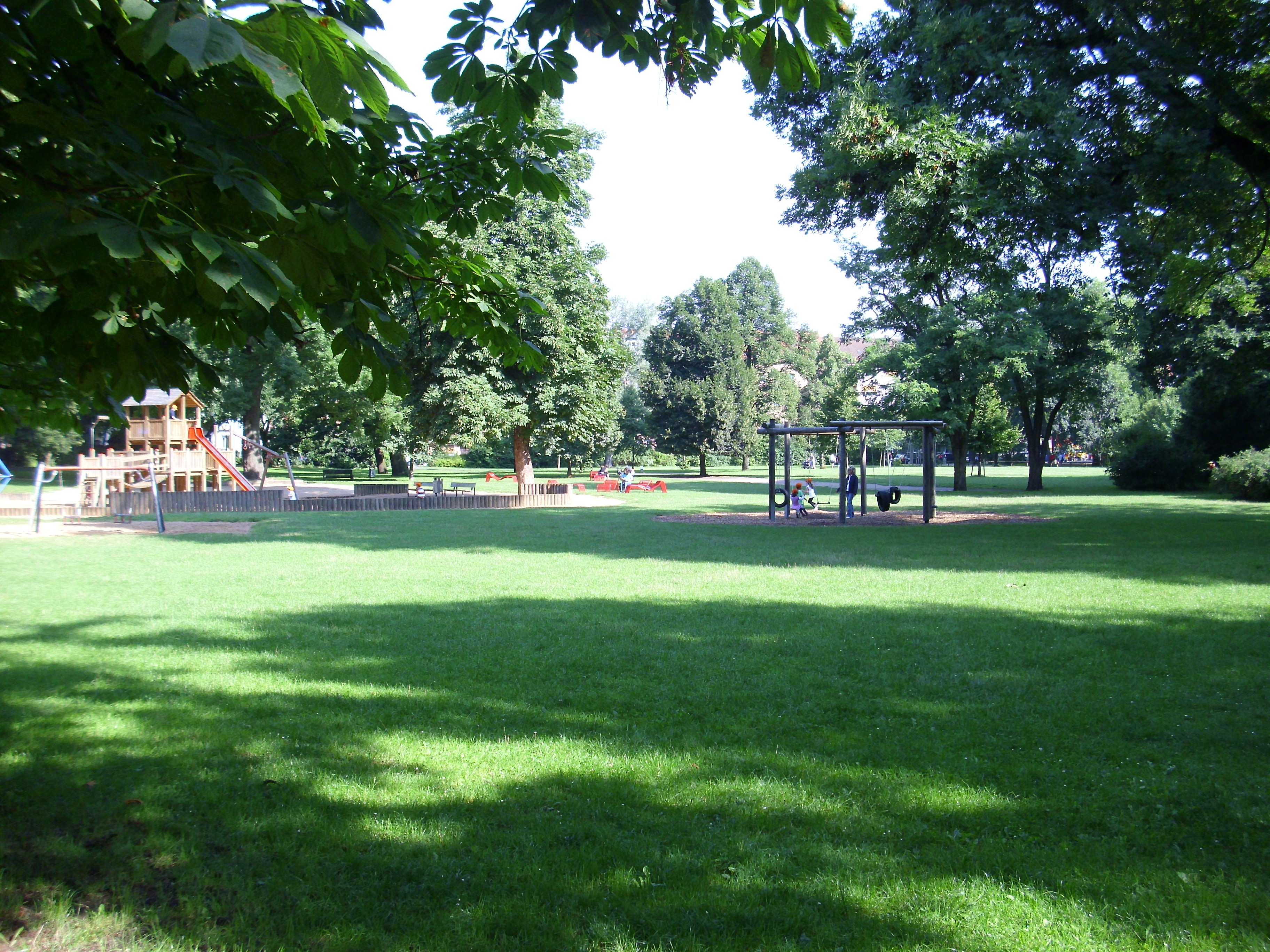 Kinderspielplatz im Rosenaupark (August 2010)